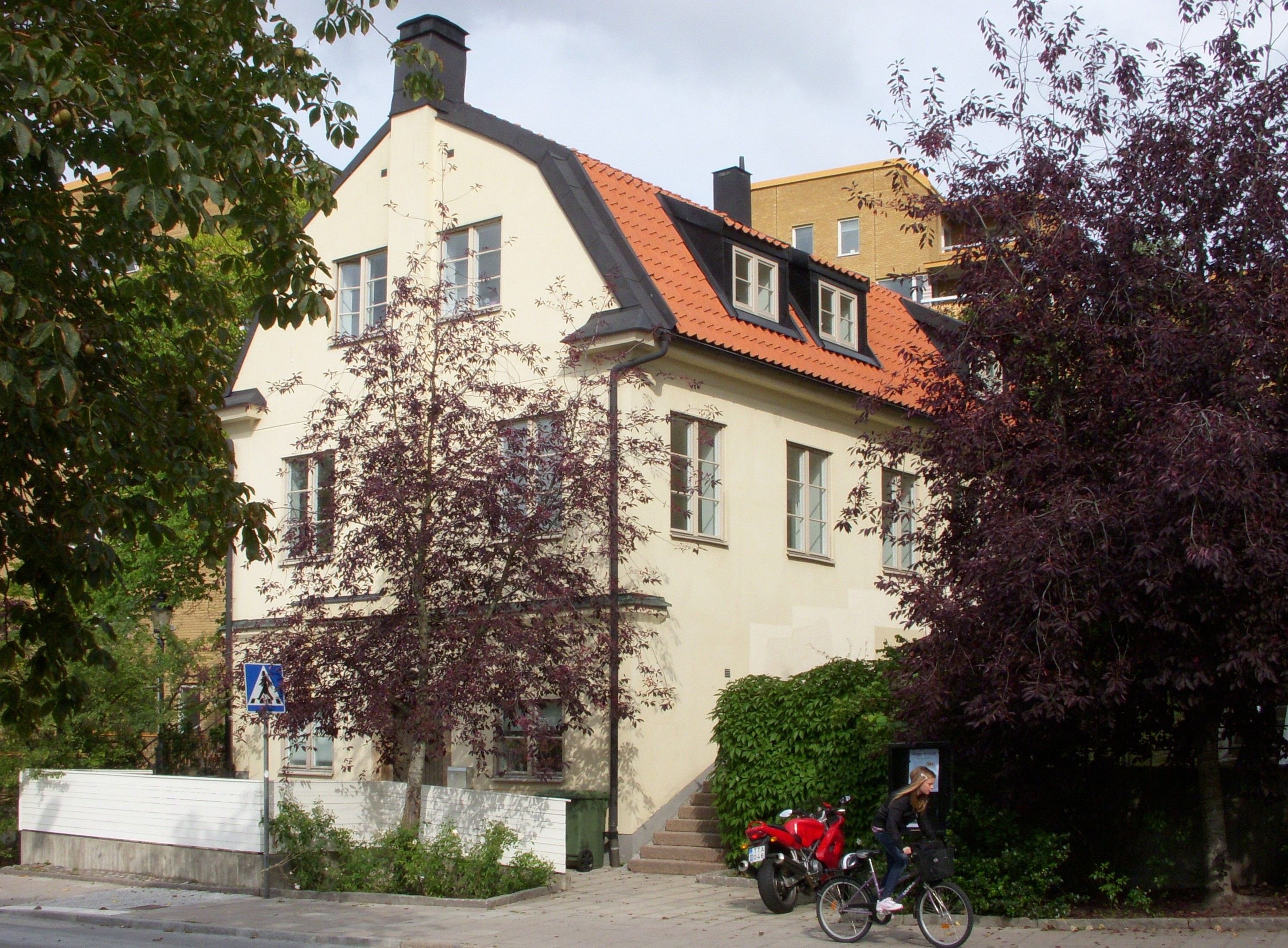 Ekensberg, kvarvarande bostadshus från varvstiden